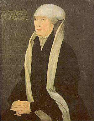 Sophia von Pommern (* 1498; † 13. Mai 1568), Königin von Dänemark und Norwegen